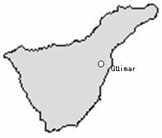 瑰瑪所在地地图，Güimar 自己制作，地图取自开源地图生成软件。